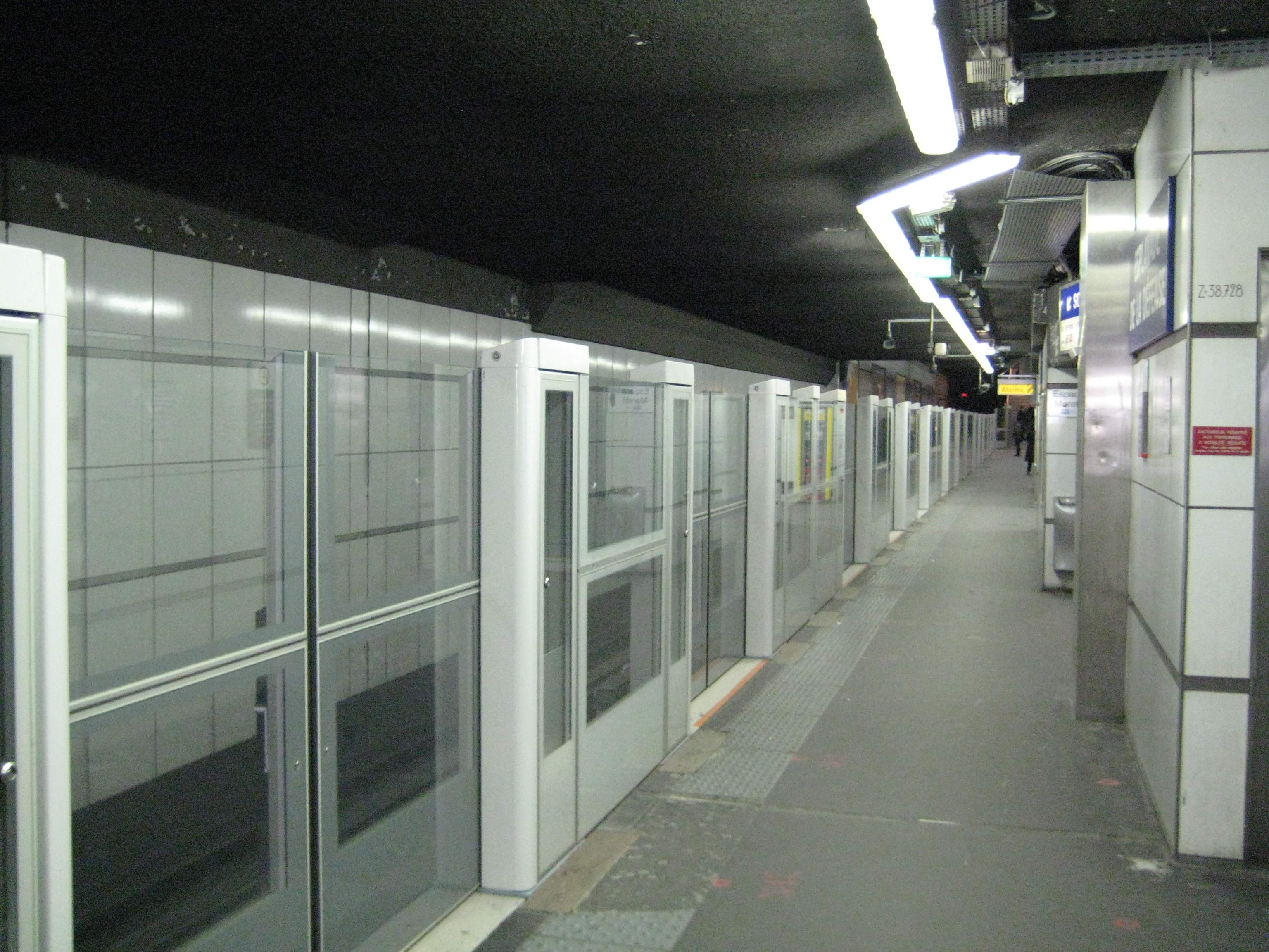 Station Esplanade de la Défense, Ligne 1 métro de Paris. (façades de quai installées)